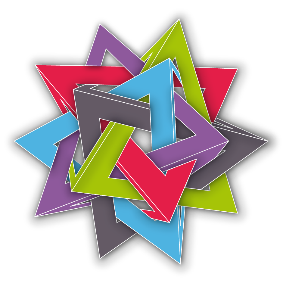 Representación gráfica de Transdisciplinariedad de la Revista estudiantil Trans-pasando Fronteras. Diseñado por @LaDeLasVioletas